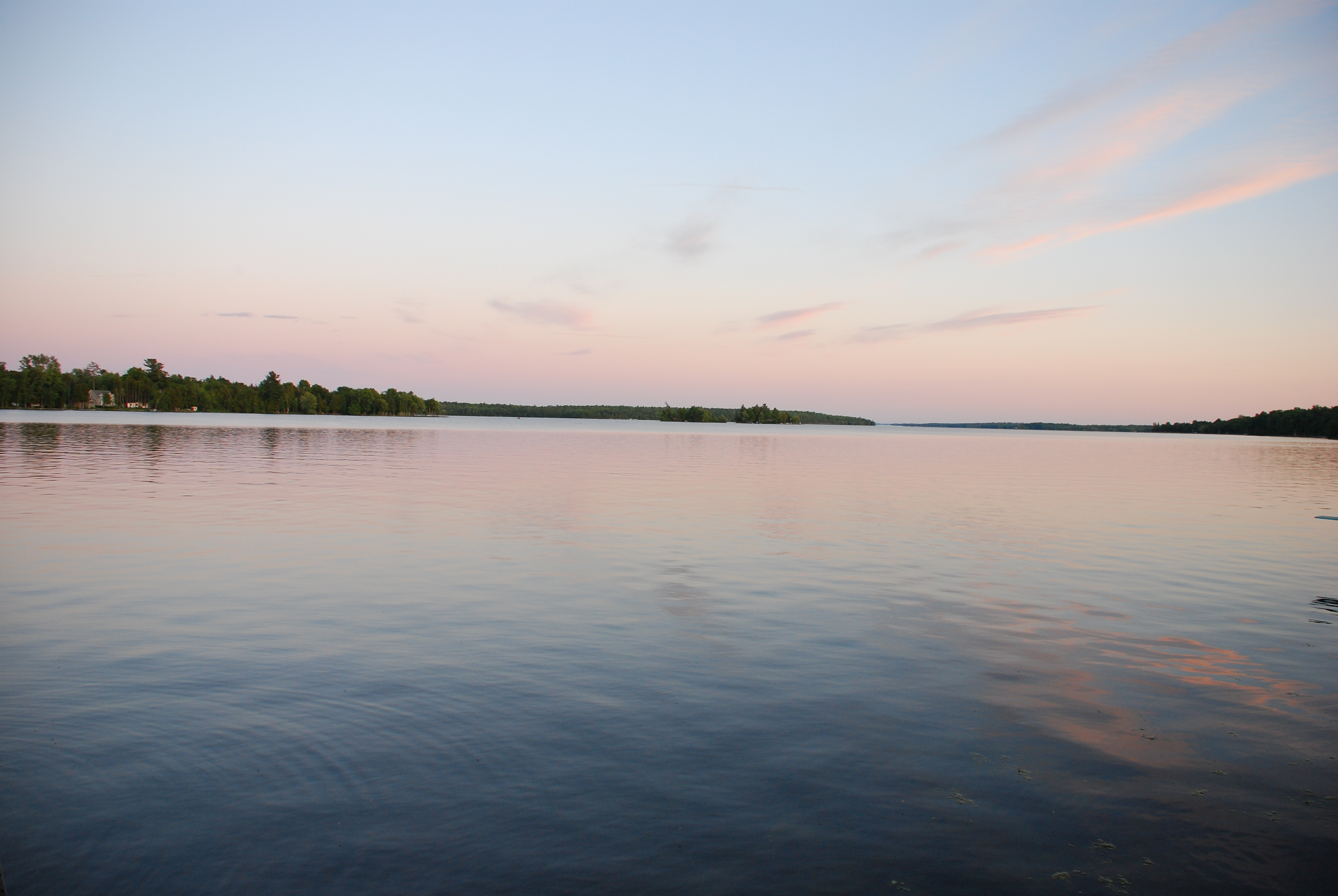 Pigeon Lake Dusk Ontario, Canada